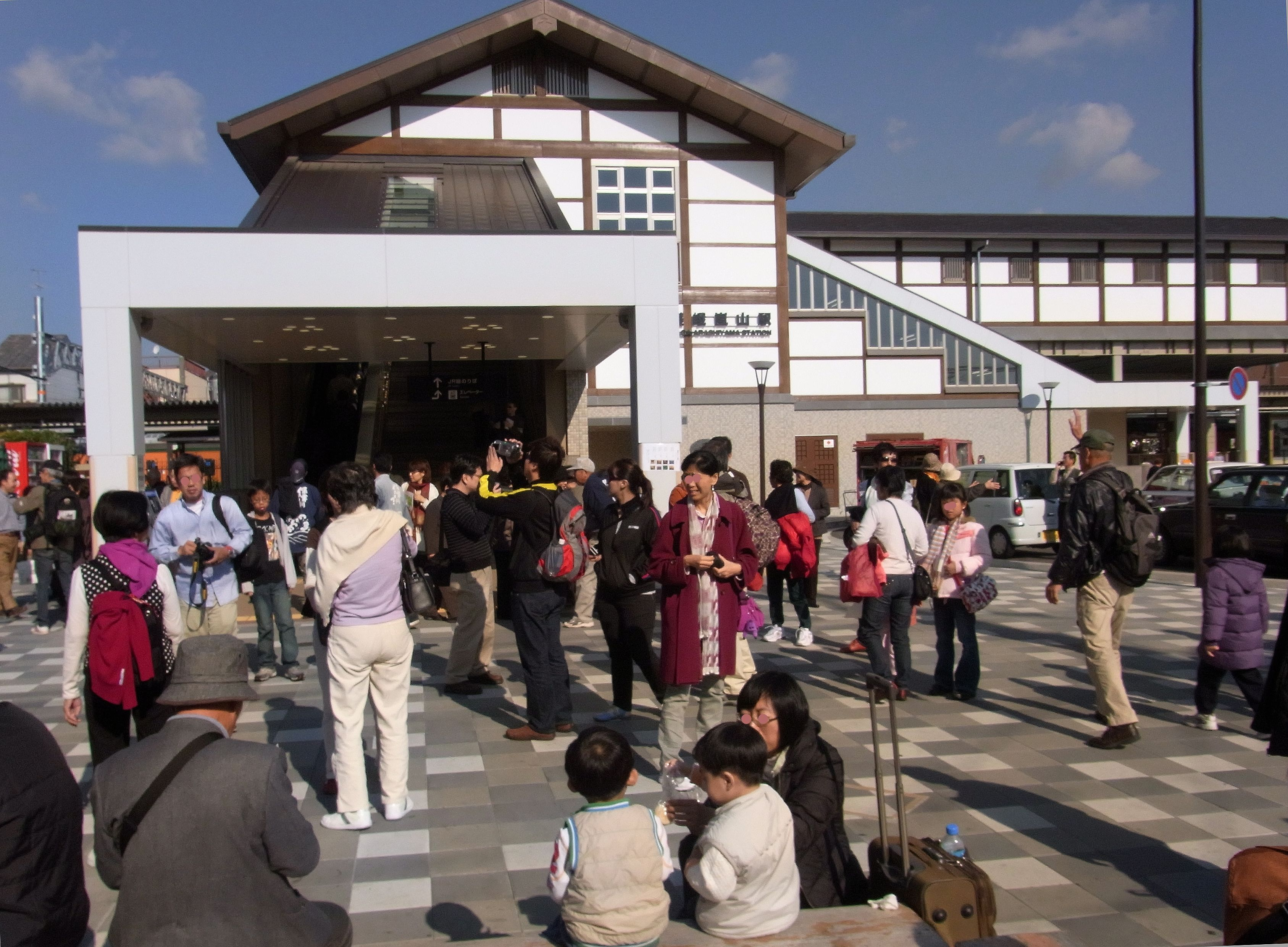 嵯峨嵐山駅